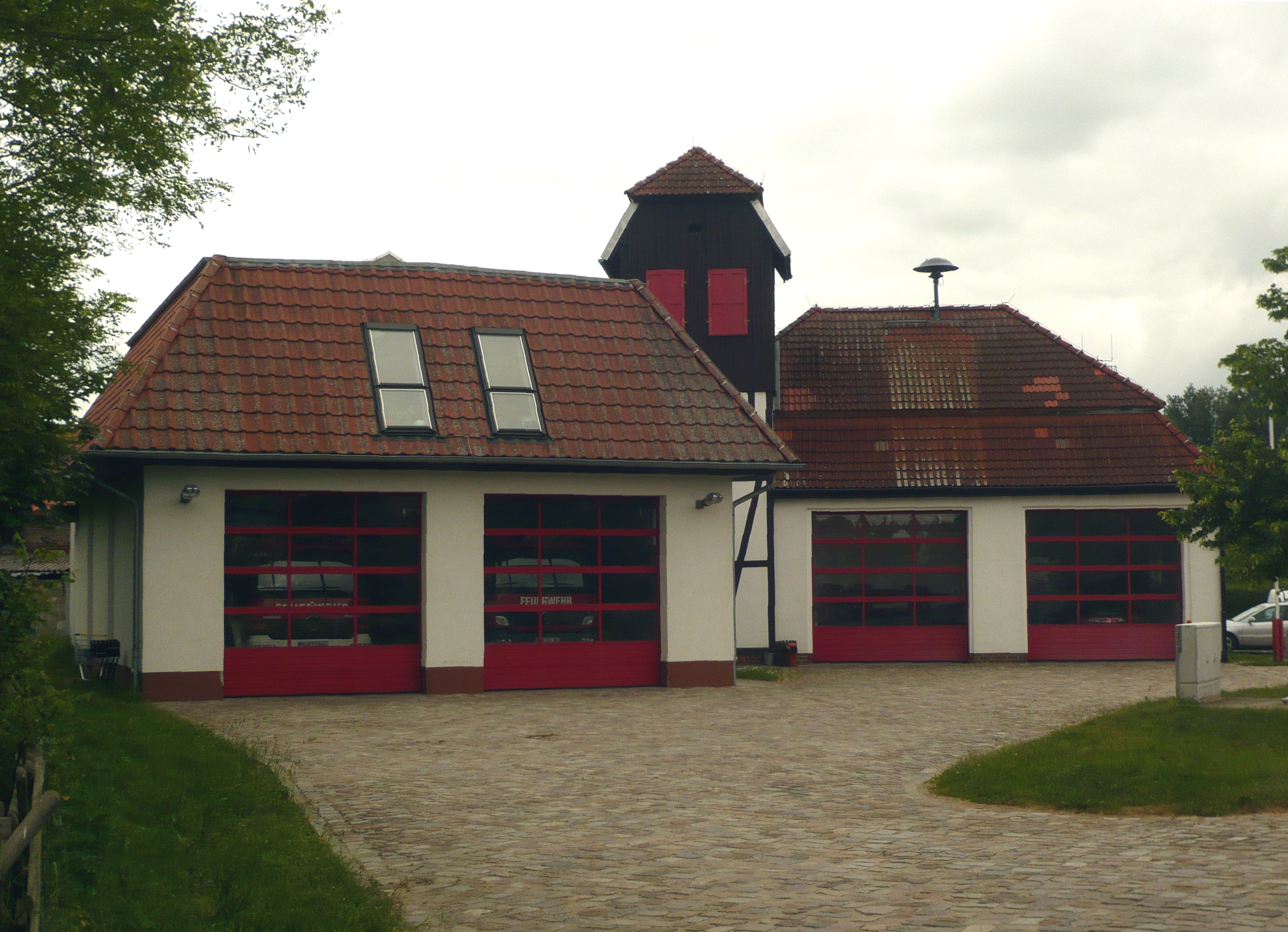 Wandlitz: Feuerwehrgebäude (alt und neu), Kirchstraße